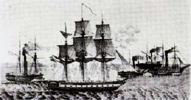 Gravure de l'époque représentant les navires danois Gejser et Valkyrien poursuivant des navires allemands à l'issue du combat de Heligoland du 4 juin 1849